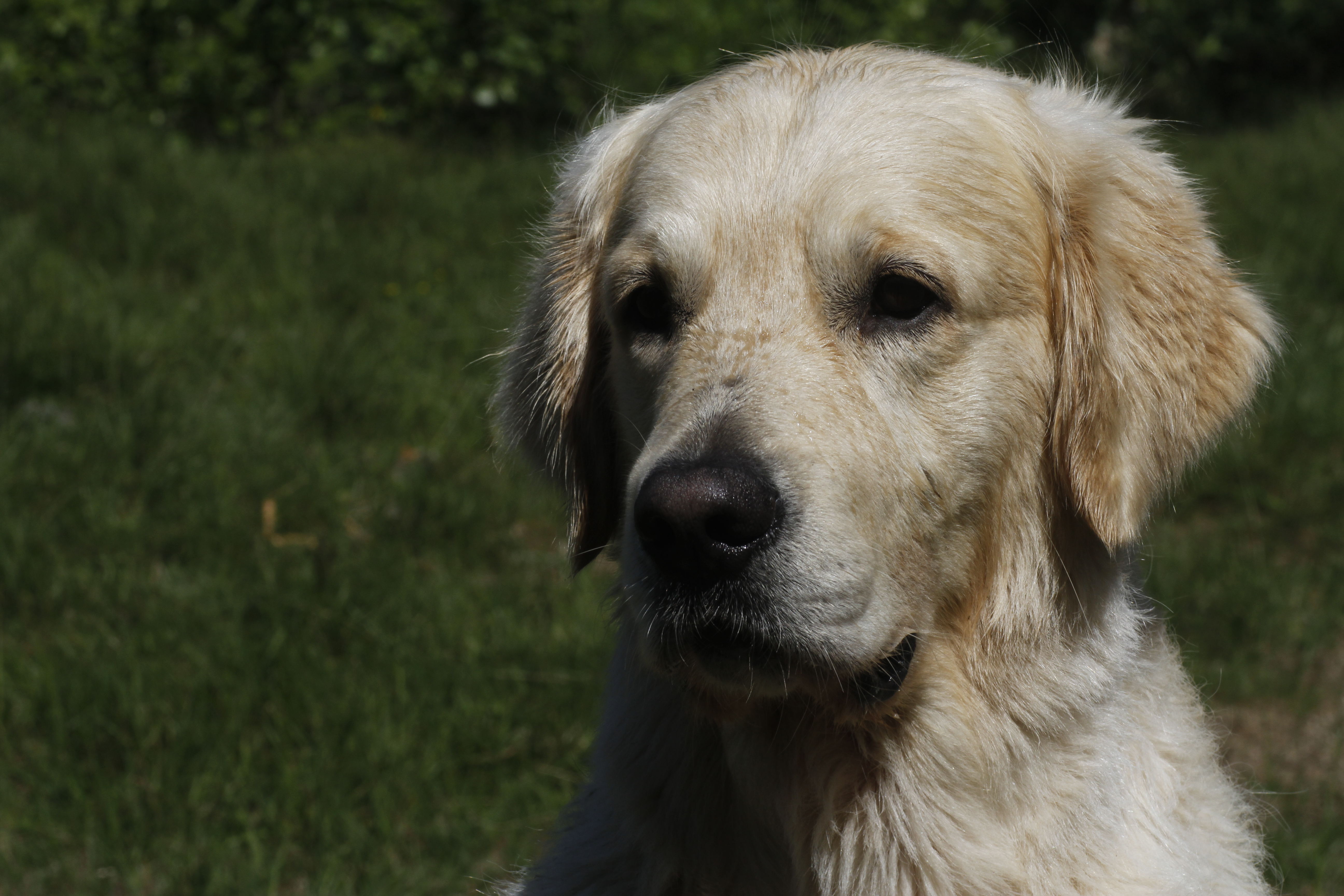 Golden hanhund